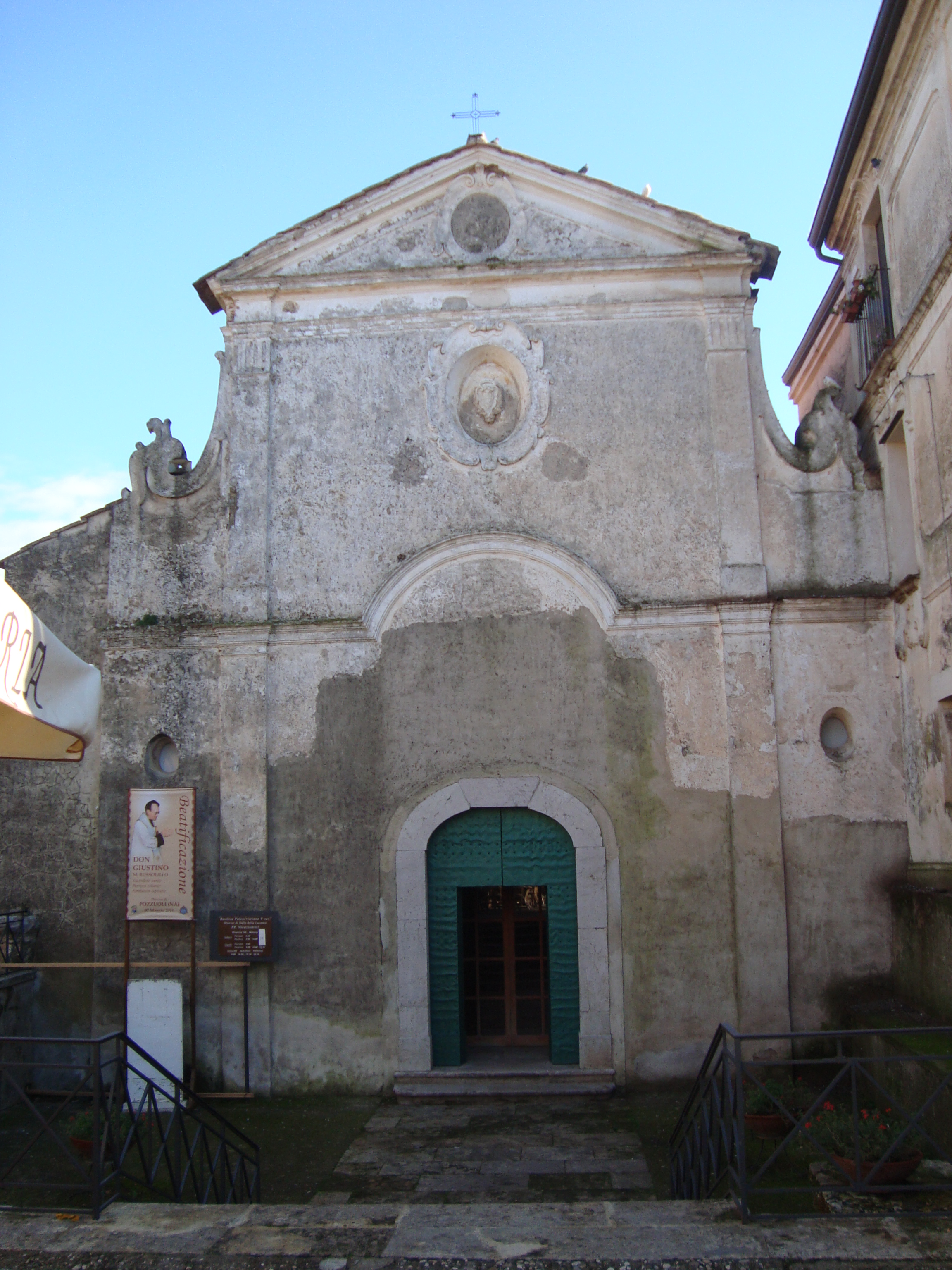 Facciata della basilica paleocristiana dedicata all'Annunziata, accanto al sito archeologico di Paestum.